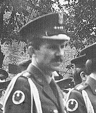 kpt. Józef Kulak (dowódca strażnicy) - Strażnica WOP Pokrzywna.